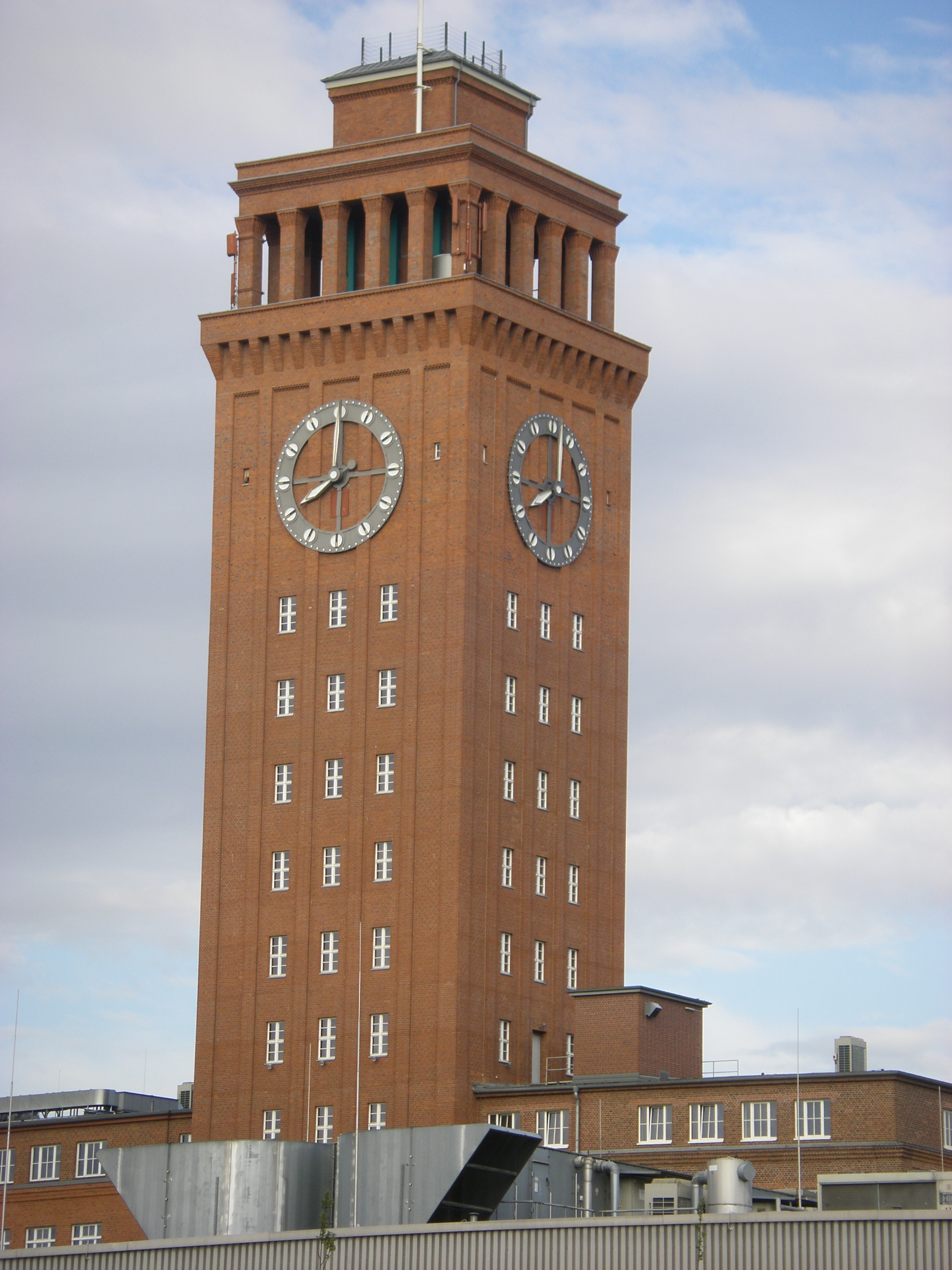 Berlin-Siemensstadt Wernerwerkdamm